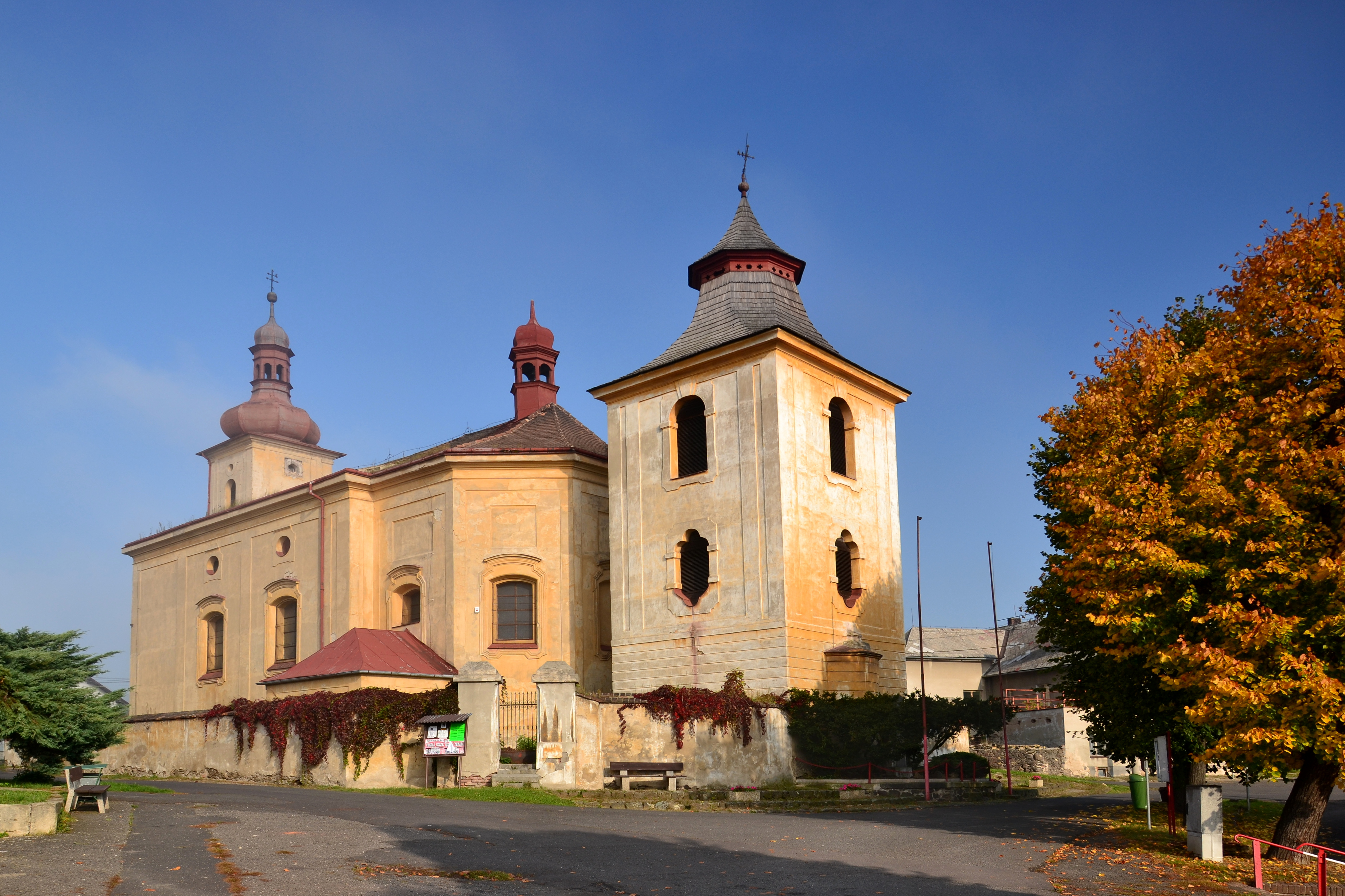 Kostel svatého Petra a Pavla se zvonicí